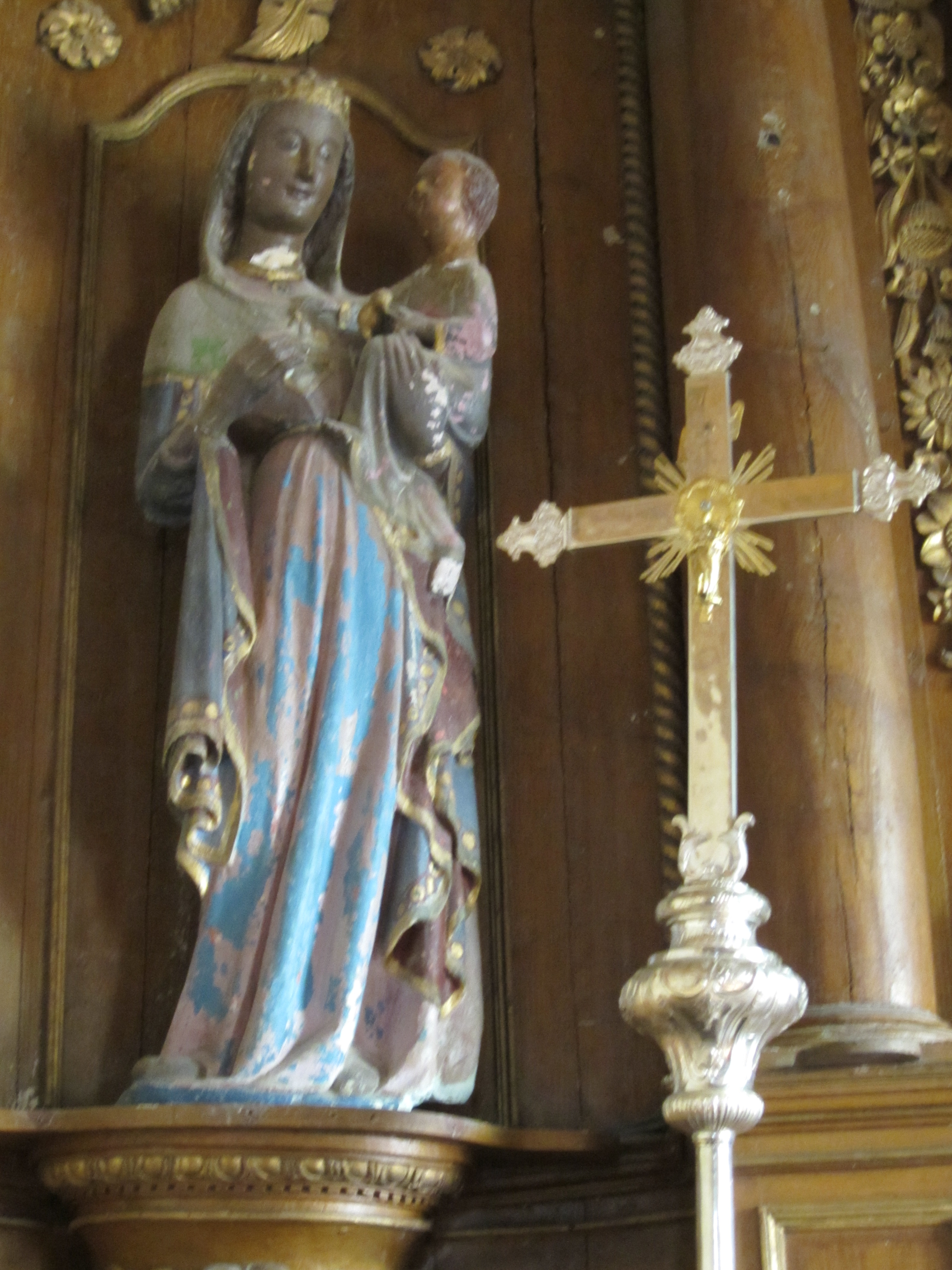 Église Notre-Dame-de-l'Assomption, Le Mesnil-Gilbert